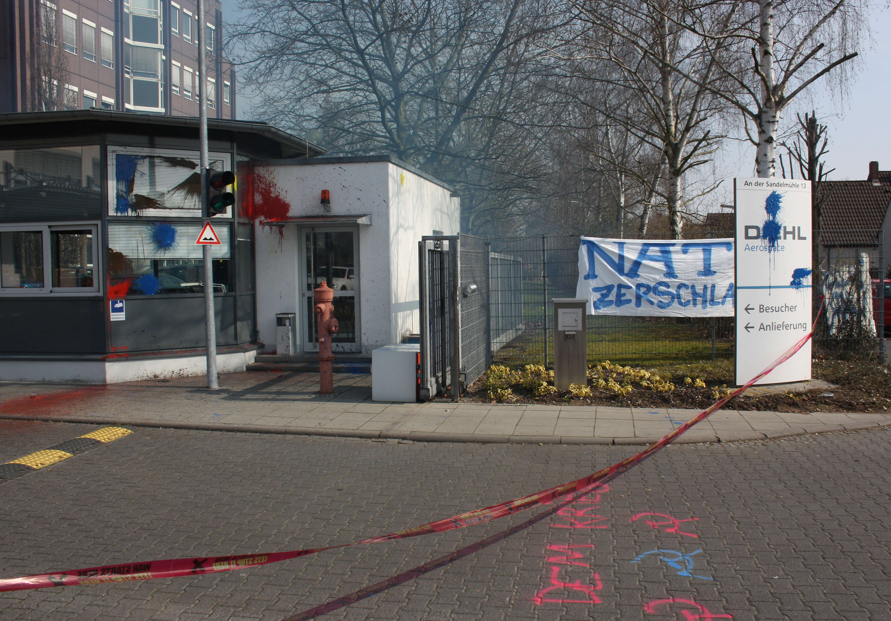 Niederlassung von Diehl in Frankfurt/Main - anlässlich der Blockupy-Proteste am Aufnahmetag als Rüstungsunternehmen von Antrimilitaristen mit Farbbeuteln beworfen